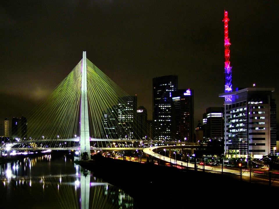 Ponte estaiada no Itaim Bibi, em São Paulo, Brasil.